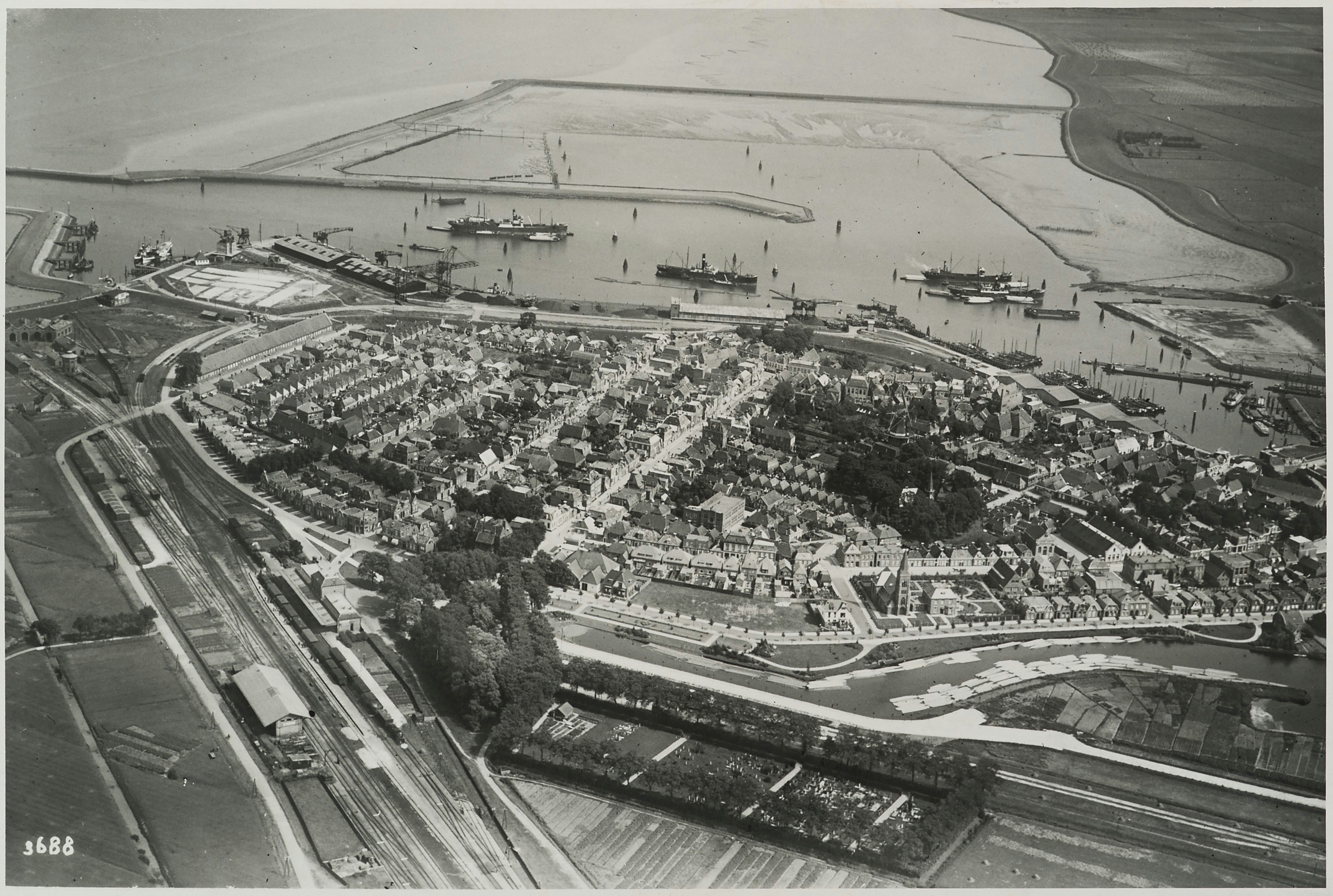 Delfzijl: Luchtfoto overzicht haven en wijk (opmerking: Foto KLM)